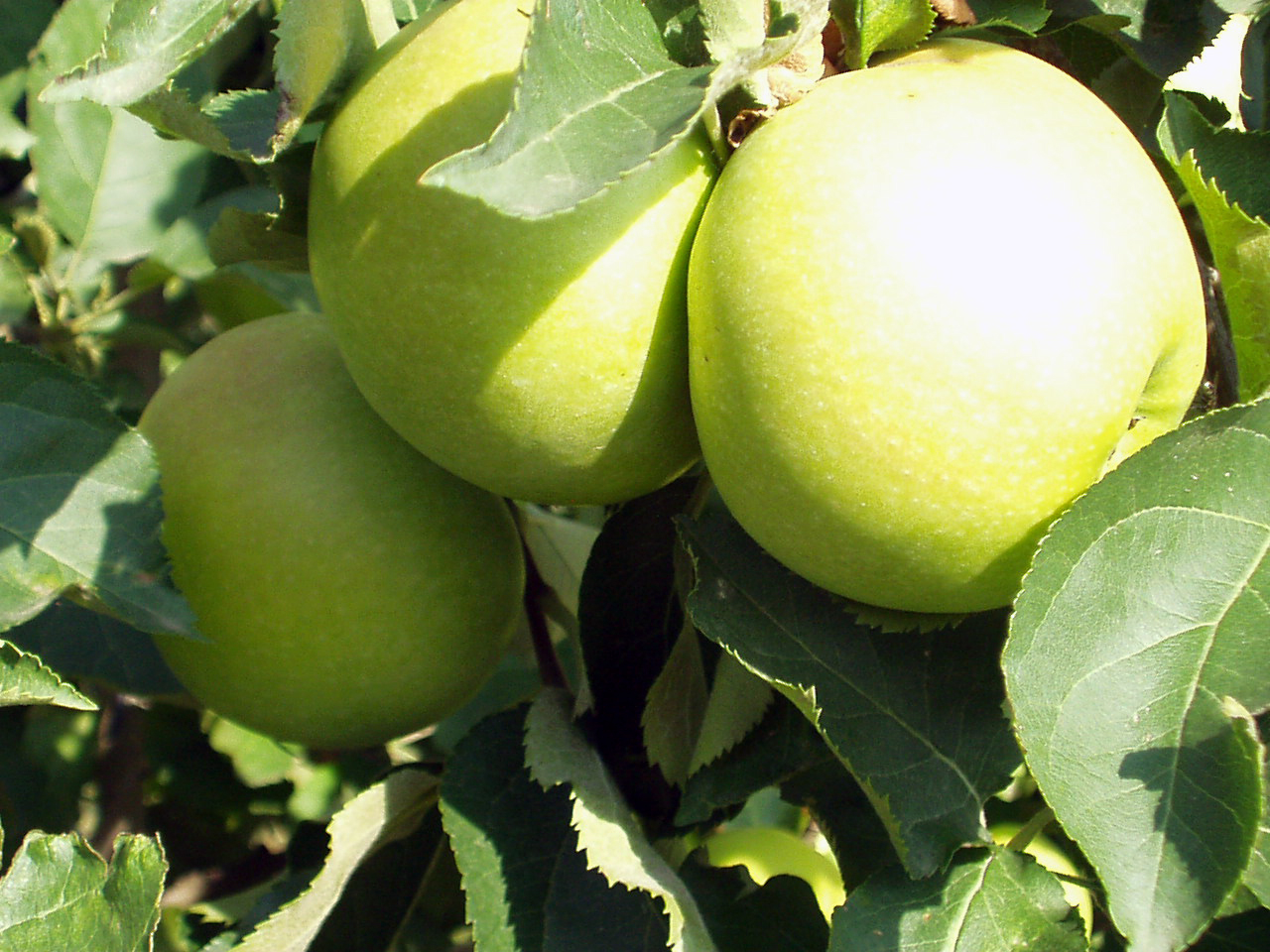 Golden Delicious kurz vor der Ernte